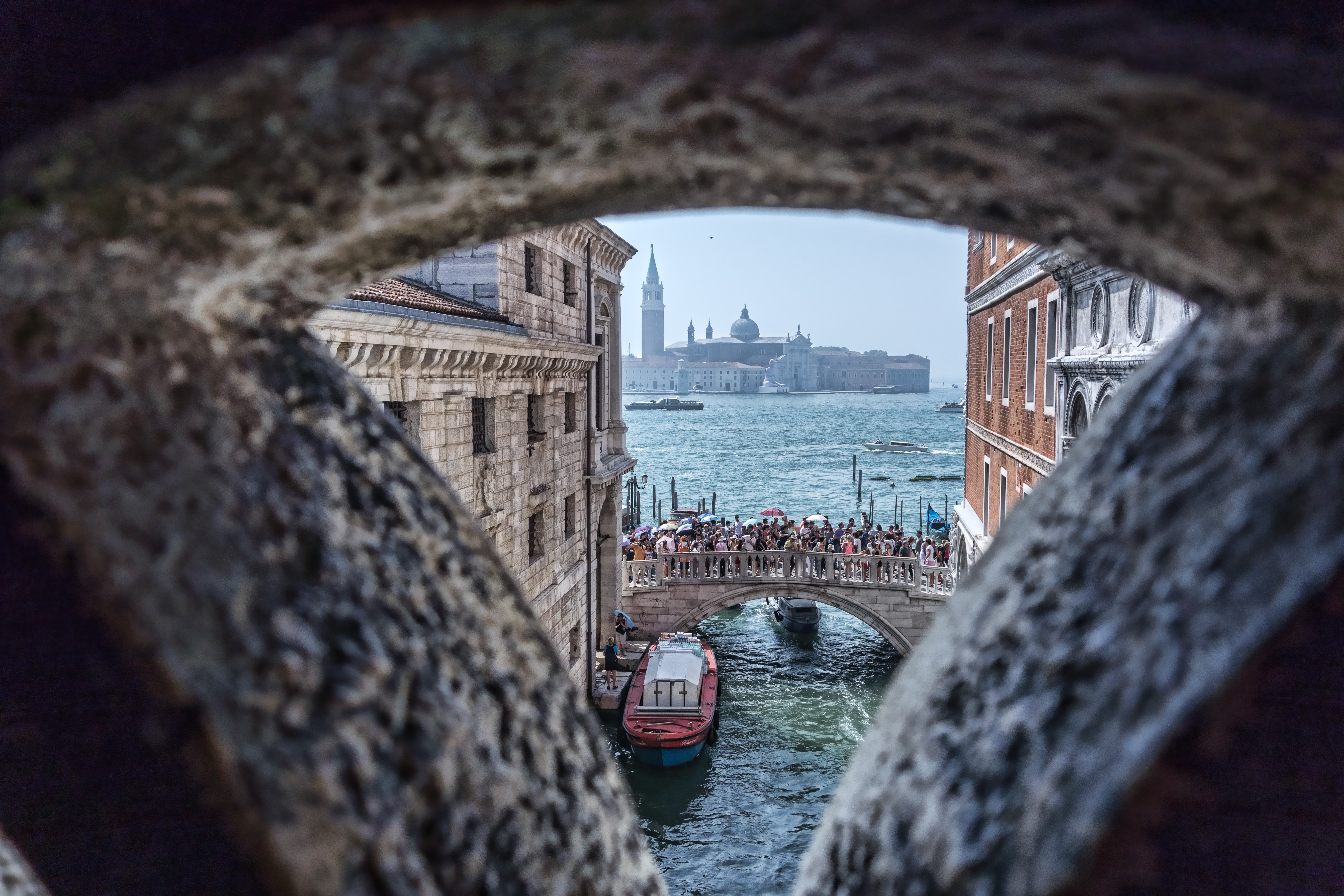 Vue de Venise à partir de l'intérieur du pont des soupirs